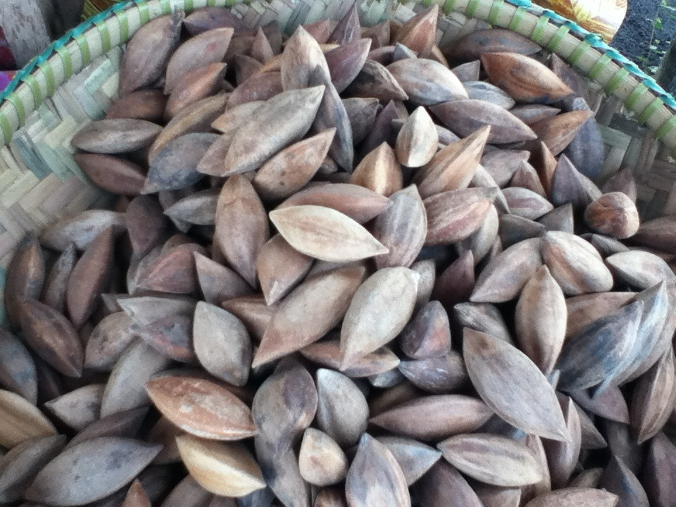 Pili nut (Canarium ovatum)